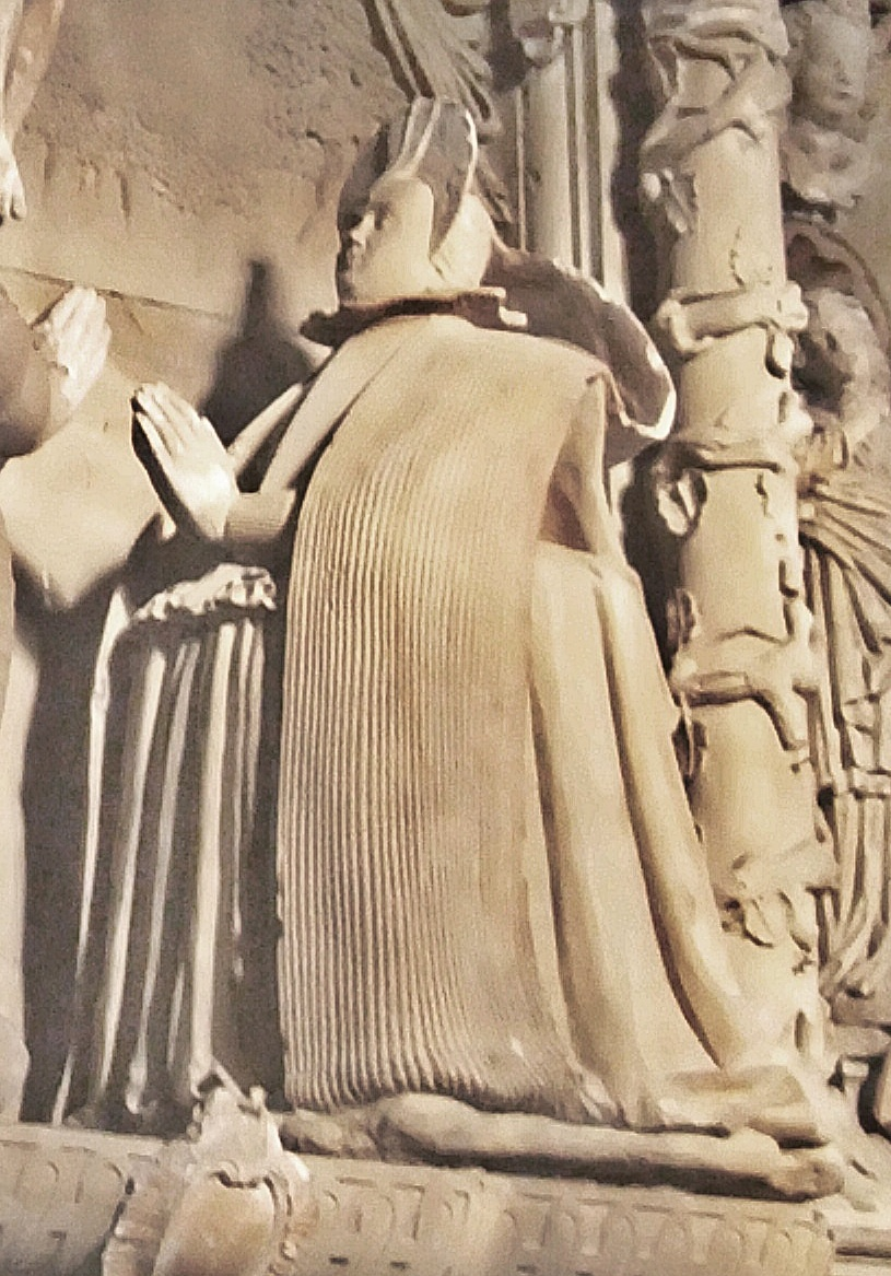 Schlosskirche Bad Dürkheim, Grabkapelle, Doppelepitaph Leiningen, Maria Elisabeth von Pfalz-Zweibrücken (1612), durch Heirat Gräfin von Leiningen